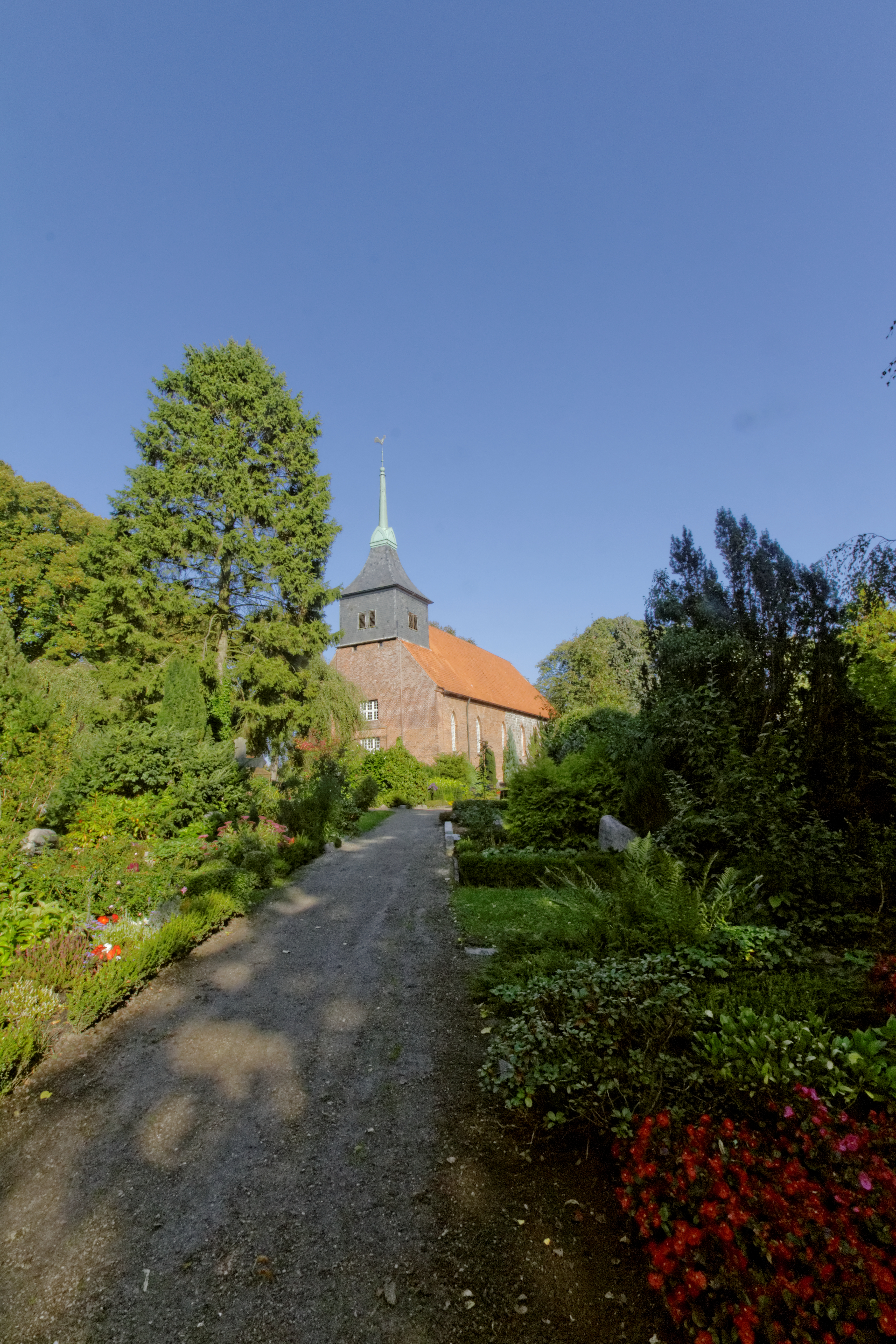 Dänischenhagen, Kirchenstrasse; Kirchhof